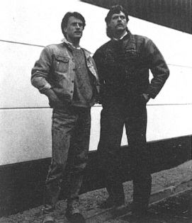 Laserdance's two producers